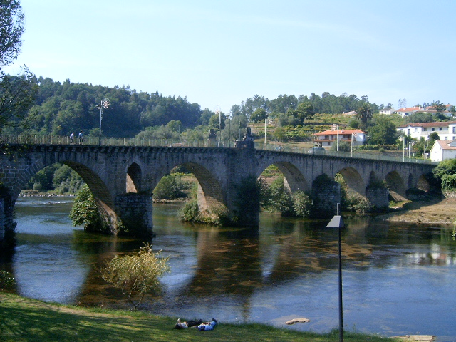 Ponte sobre o Lima, em Ponte da Barca, Portugal